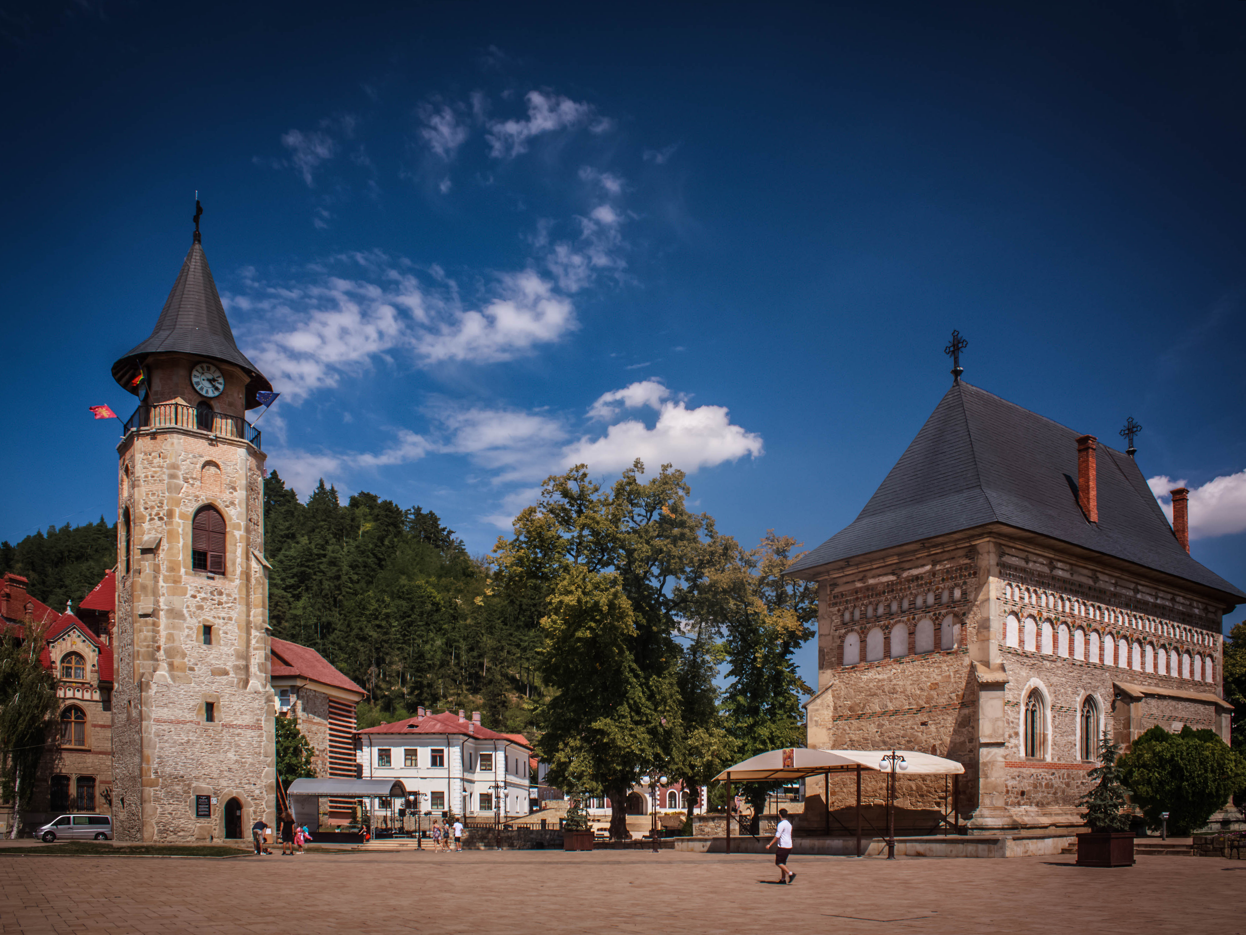 Ansamblul Curții Domnești